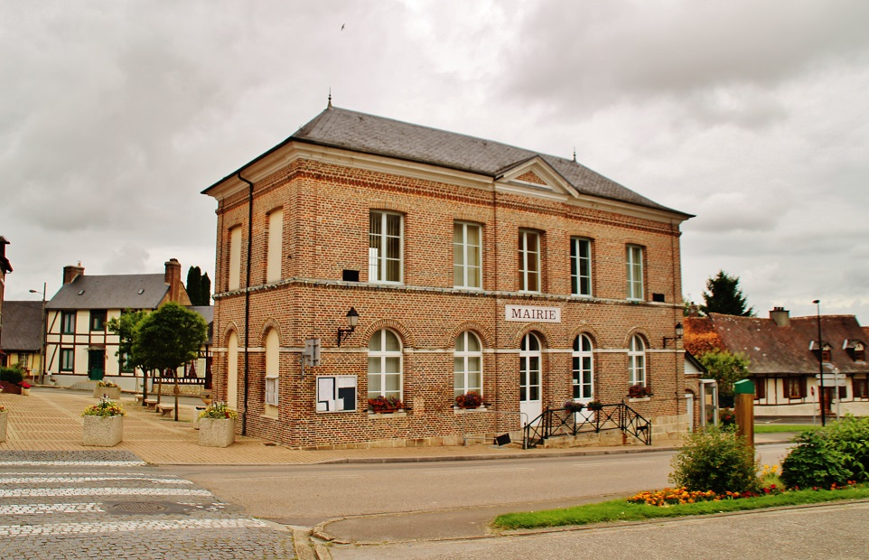 La Mairie